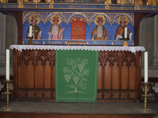 Stralsund,_Germany,_Marienkirche,_Marienkrönungsaltar,_Predella_(2006-09-15)